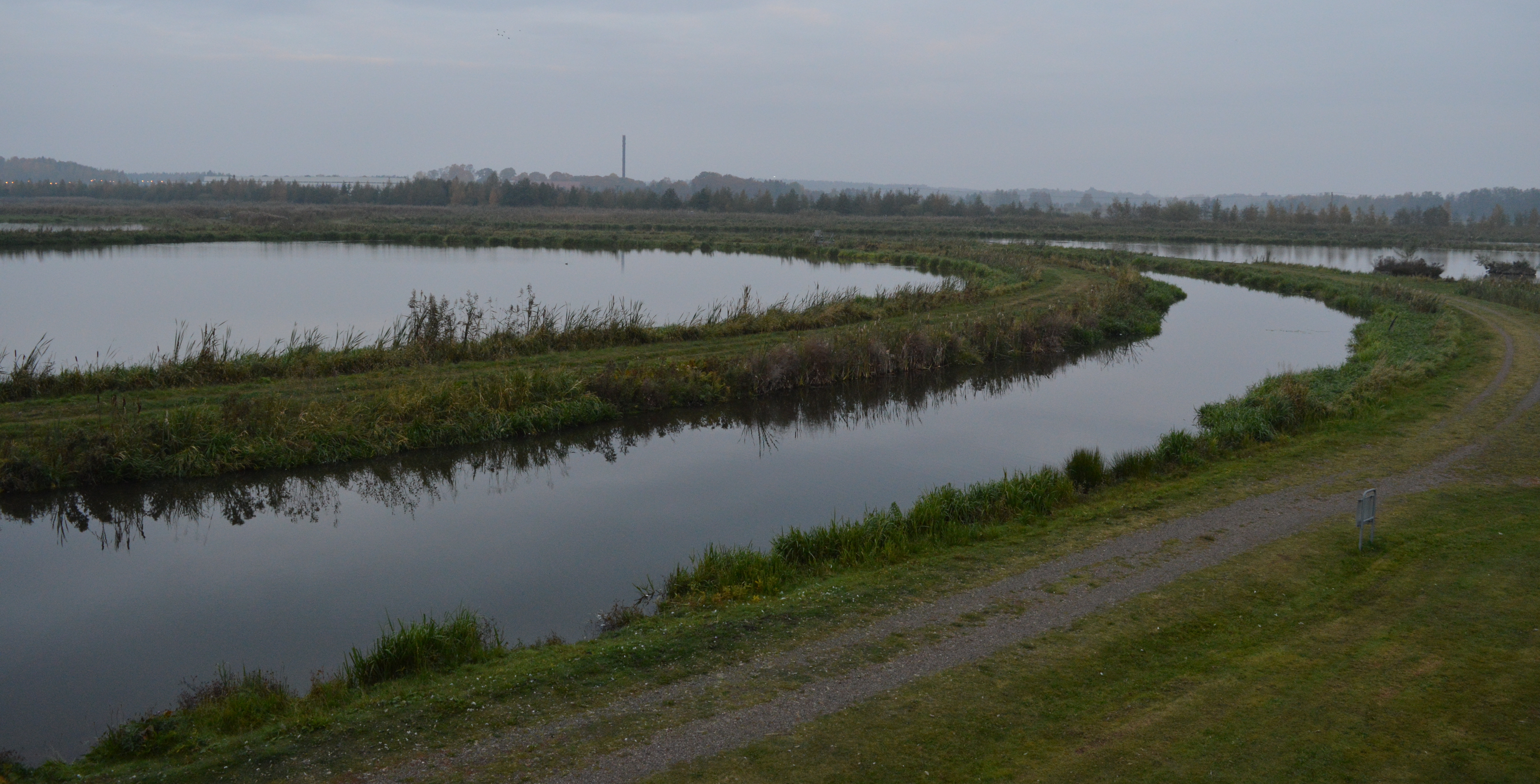 Ekeby våtmark, vy från fågelskådartorn